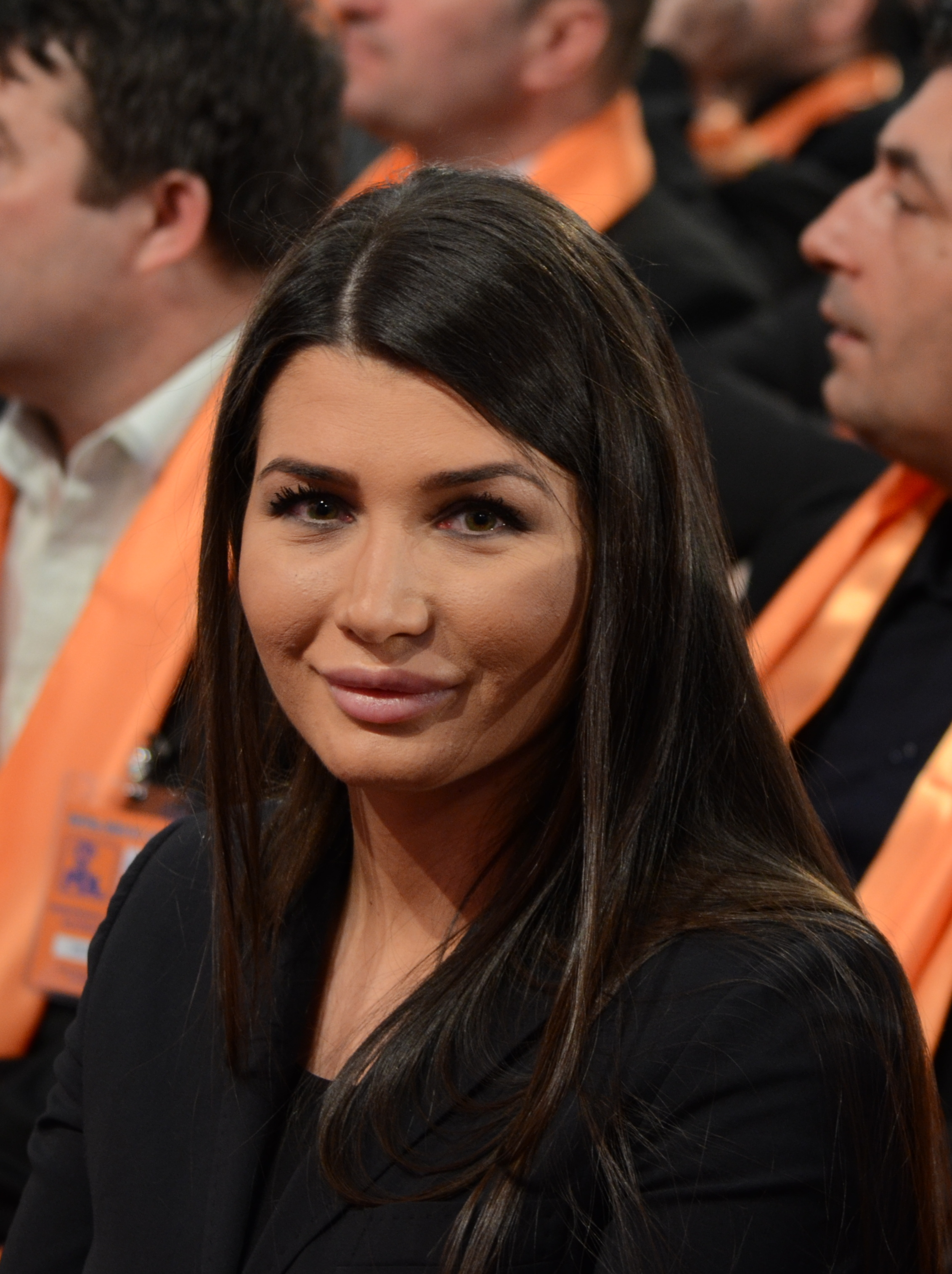 Elena Băsescu (în public, la Convenția națională extraordinară a Partidului Democrat-Liberal, 23 martie 2013)